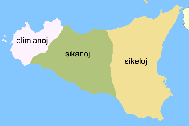 La praaj triboj de Sicilio - elimianoj, sikanoj kaj sikeloj - antaŭ la tempo de la fenicia kaj greka koloniigo de la insulo. Fonto estas anglalingva versio de la sama mapo en la vikipedia komunejo: "ItalicTribesOfSicily.png"